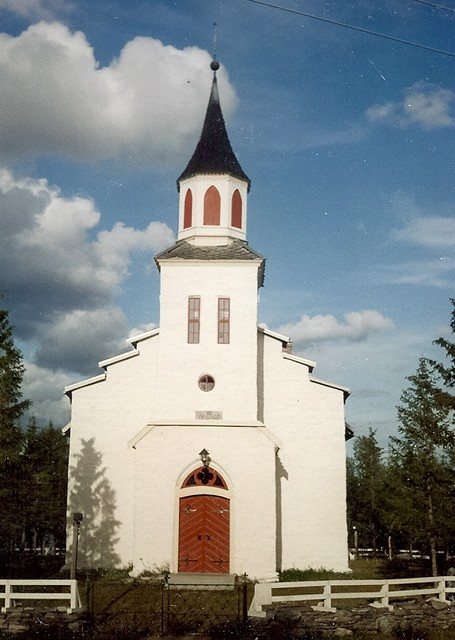 Narbuvoll kirke